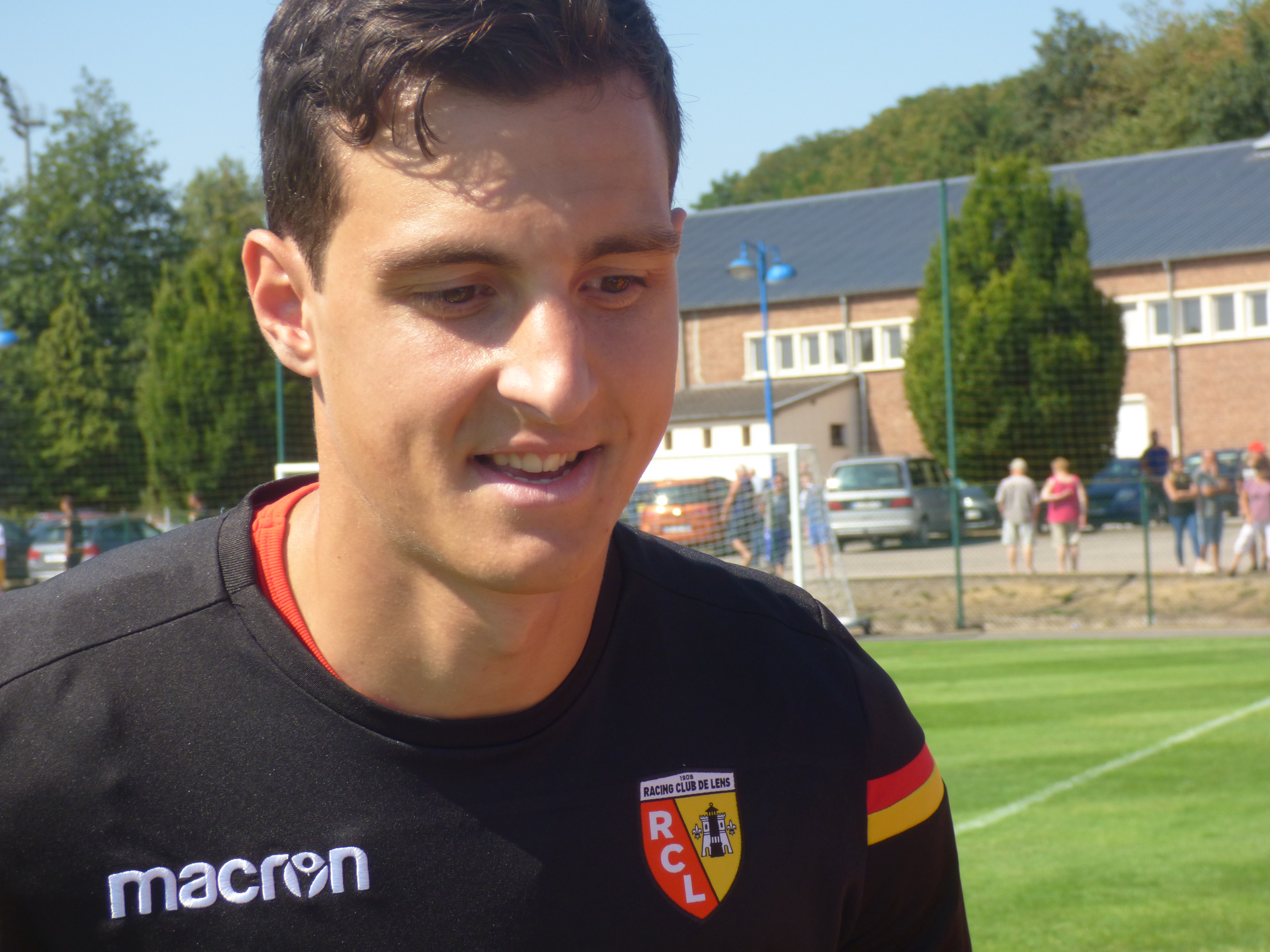 Aleksandar Radovanović lors d'un entraînement public du Racing Club de Lens, le 2 août 2018, au Centre technique et sportif de La Gaillette à Avion.